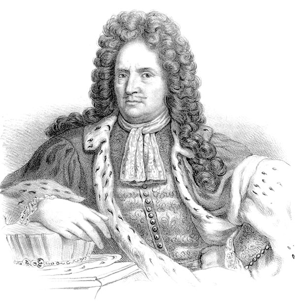 Erik Dahlbergh (1625-1703)